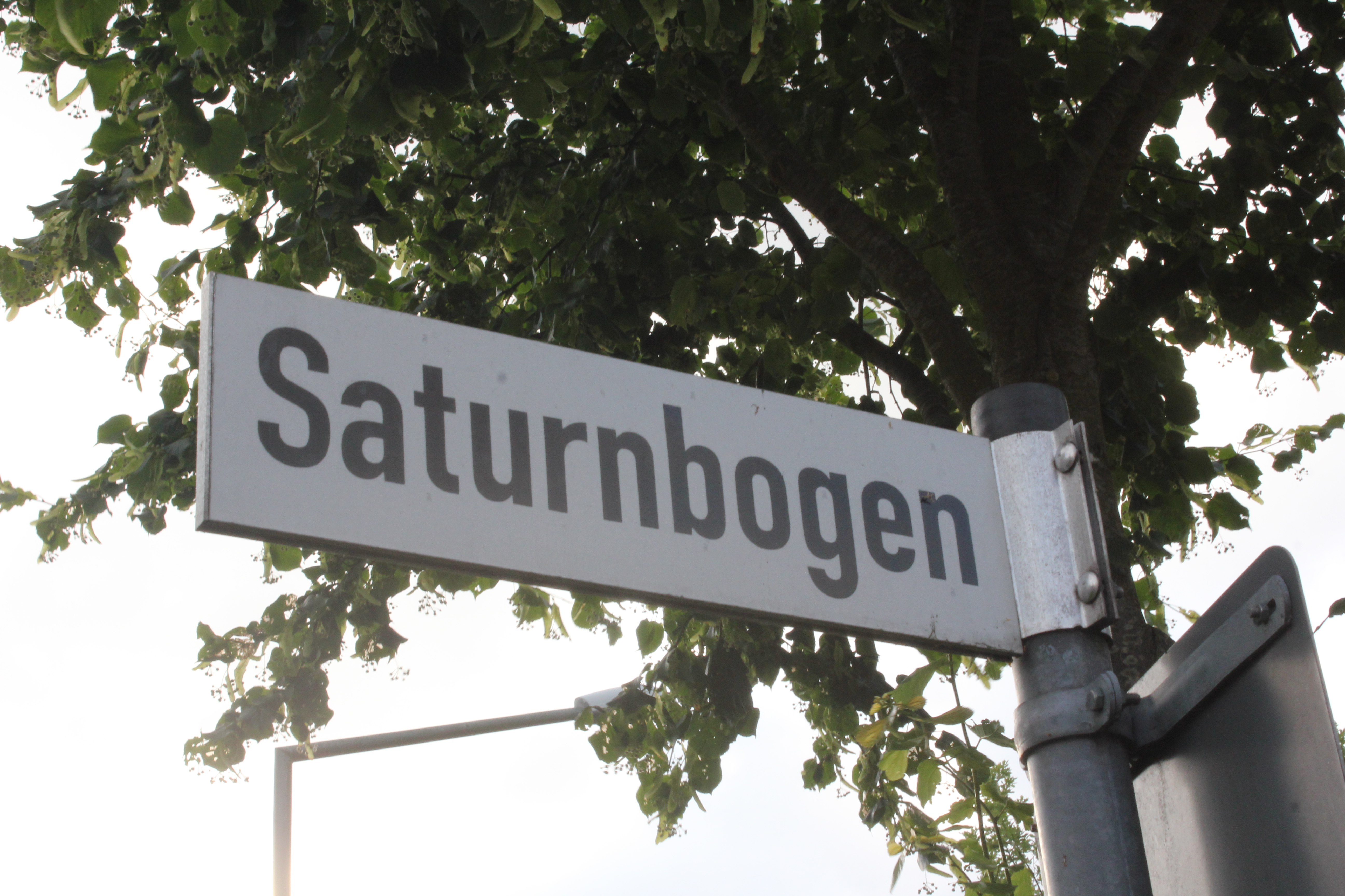 Straßenschild Saturnbogen (Flensburg)